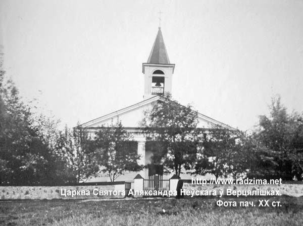 Беларуская (тарашкевіца): Верцялішкі (Vierciališki). Царква Аляксандра Неўскага